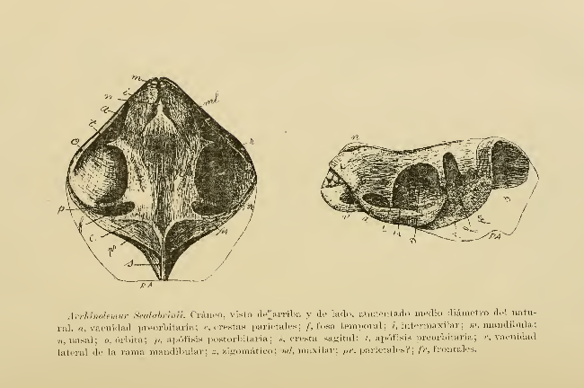 Rekonstruktion des Holotyps des Engmaulsalmlers Leporinus scalabrinii durch Florentino Ameghino als Arrhinolemur scalabrinii, ein eigentümliches Säugetier.